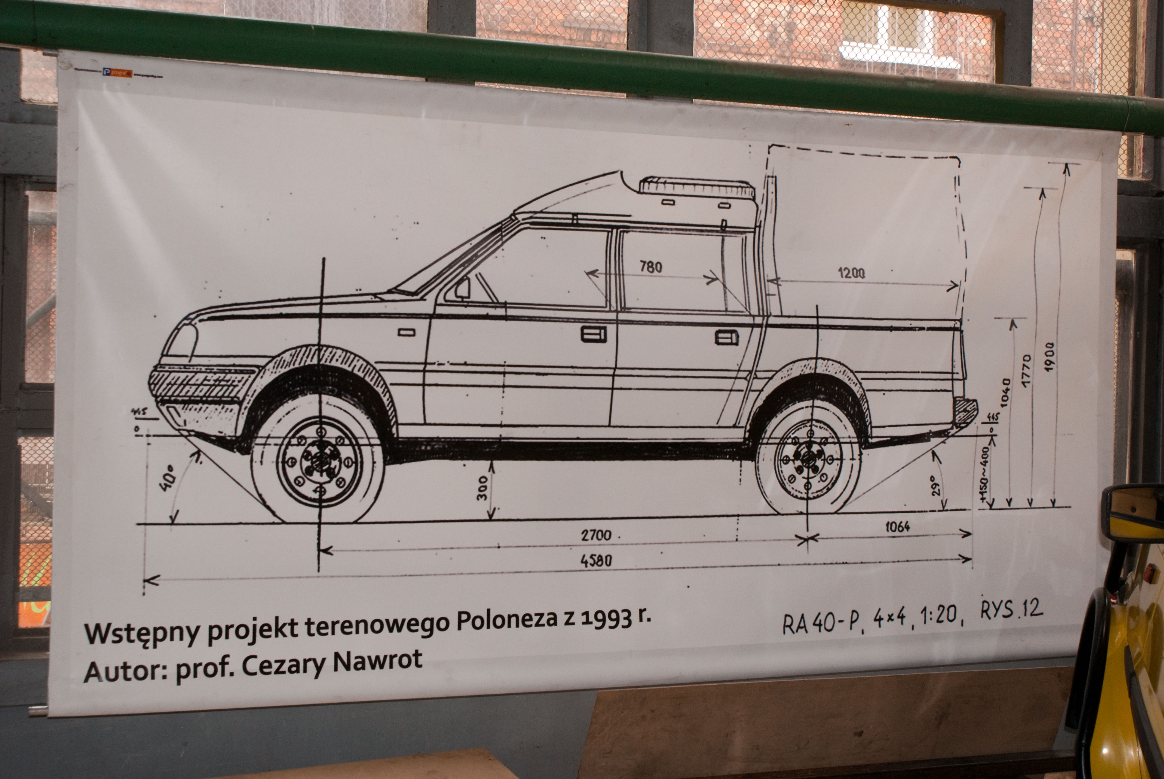 Wstępny projekt terenowego Poloneza z roku 1993.Wystawa samochodów Prywatnego Muzeum Motoryzacji i Techniki w wytwórni Wódek Koneser.